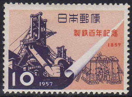 日本で近代的製鉄開始100周年を記念して発行された記念切手。描かれているのは日本最初の高炉と1957年当時の溶鉱炉である。